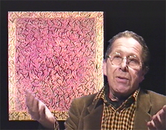 Portrait de Ouanes Amor